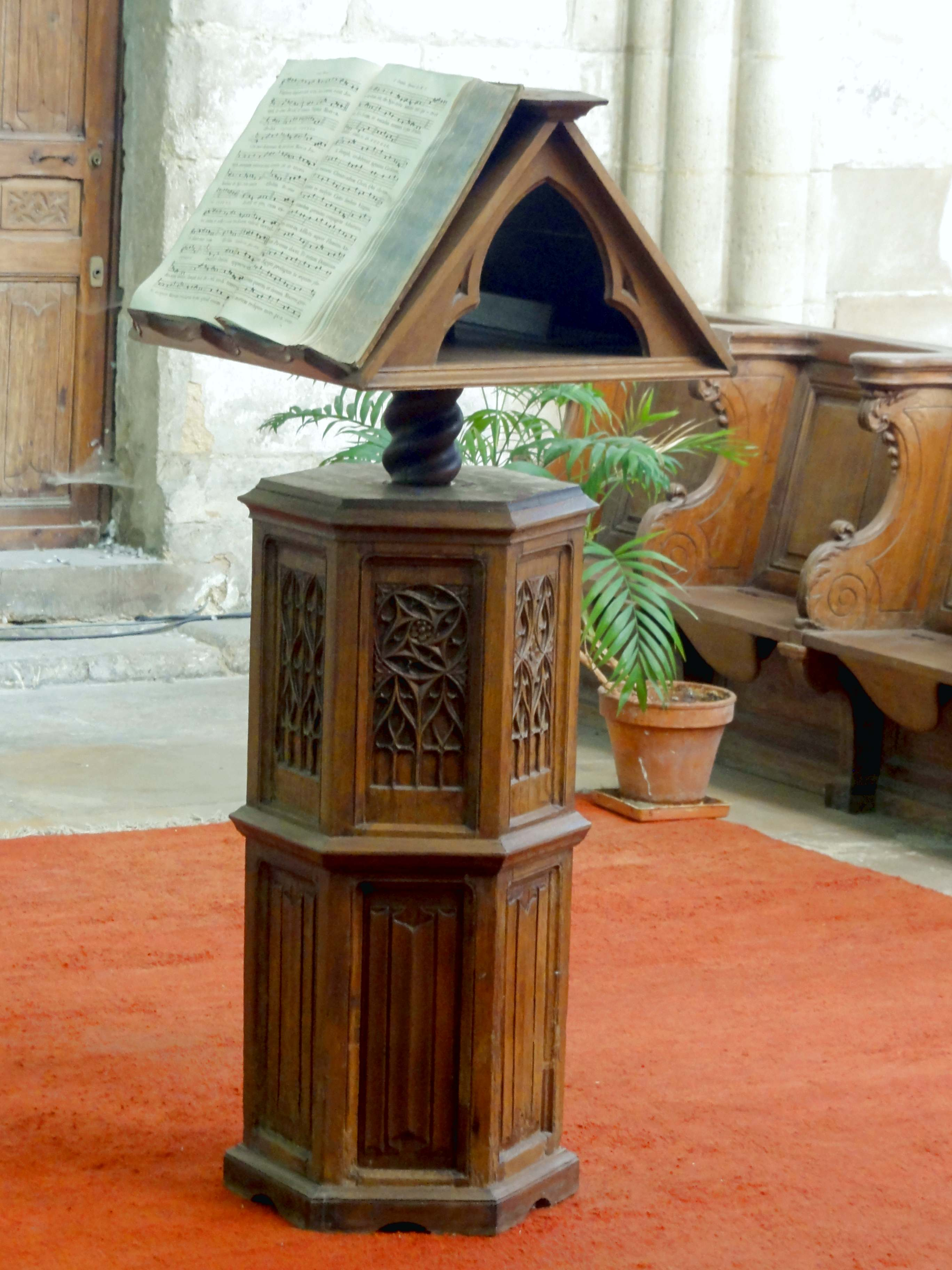 Lutrin du chœur.